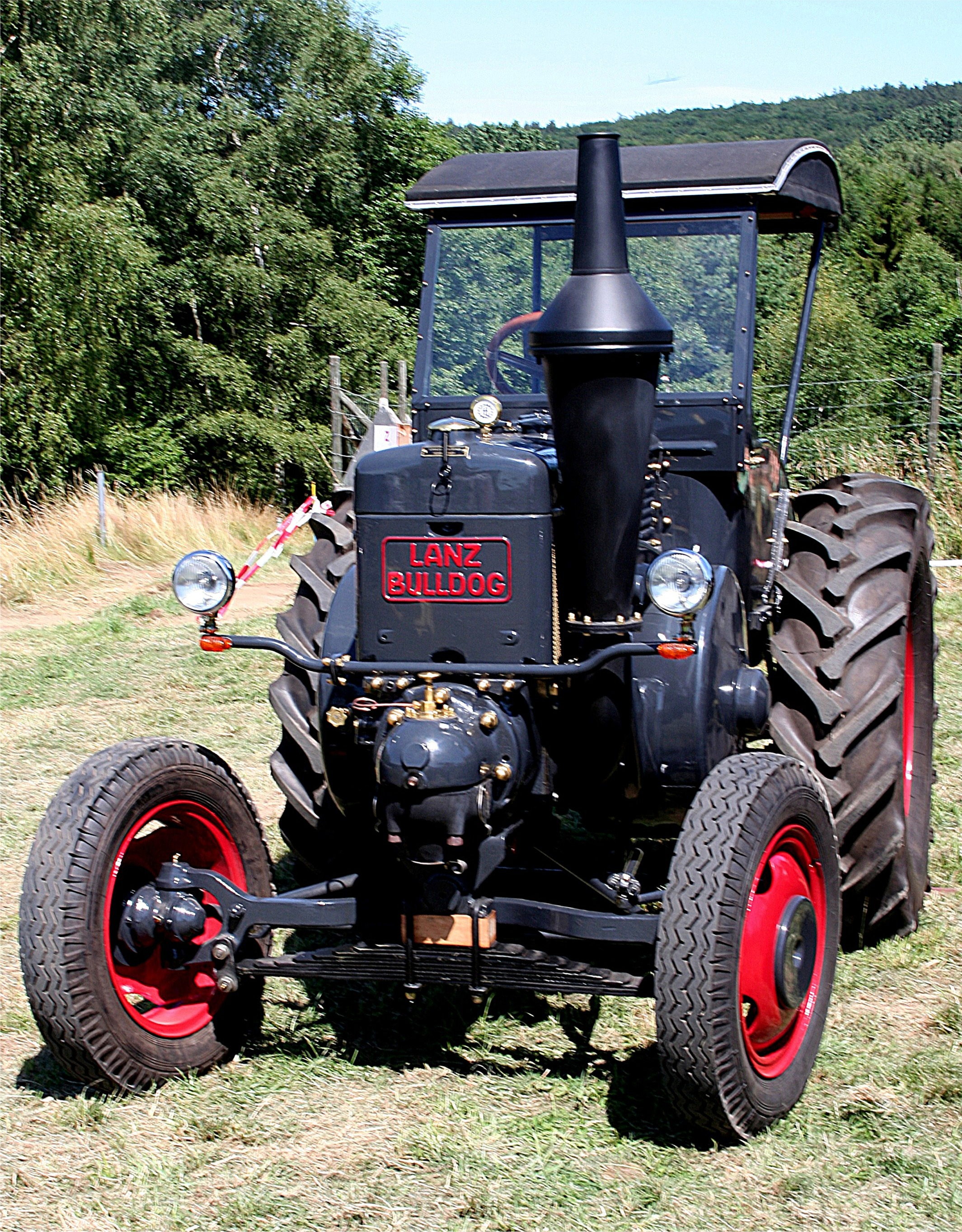 Lanz Bulldog der Baureihe D 8506, Baujahr 1939 (Bauzeit 1936 bis 1954), Einzylinder-Glühkopfmotor, Hubraum 10.338 cm³, 35 PS, aufgenommen am 15.07.2006 beim Traktortreffen in Hillscheid.